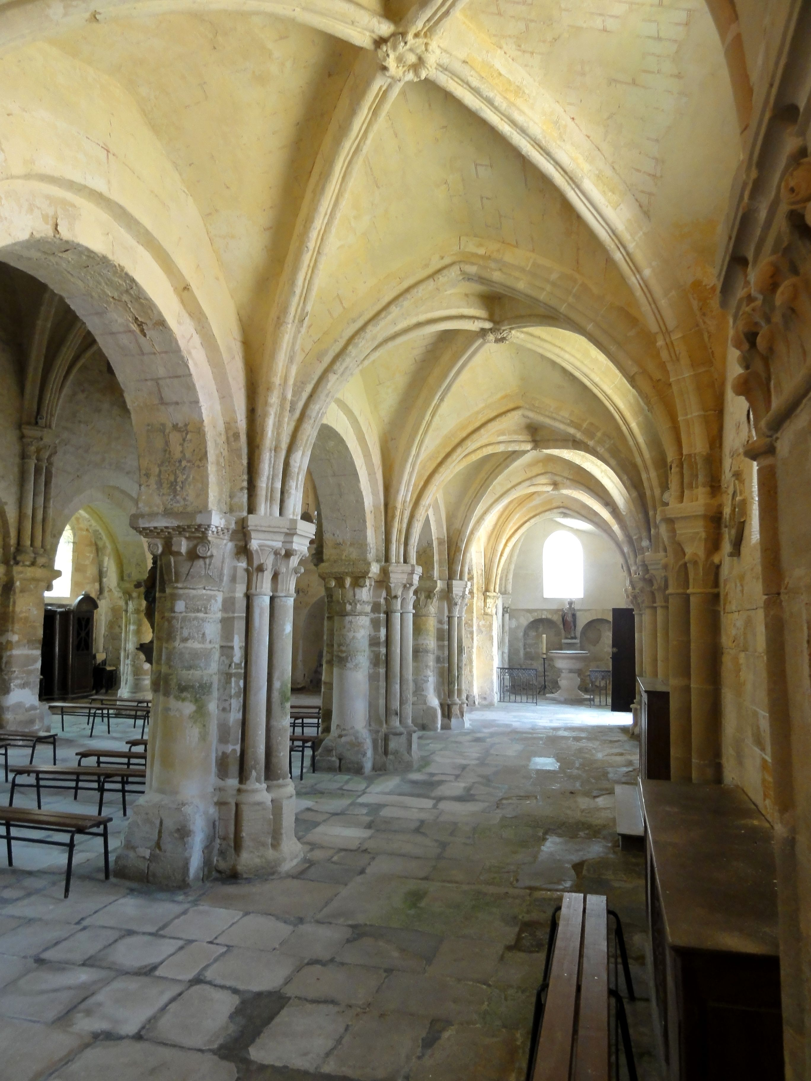 Bas-côté nord, grandes arcades.